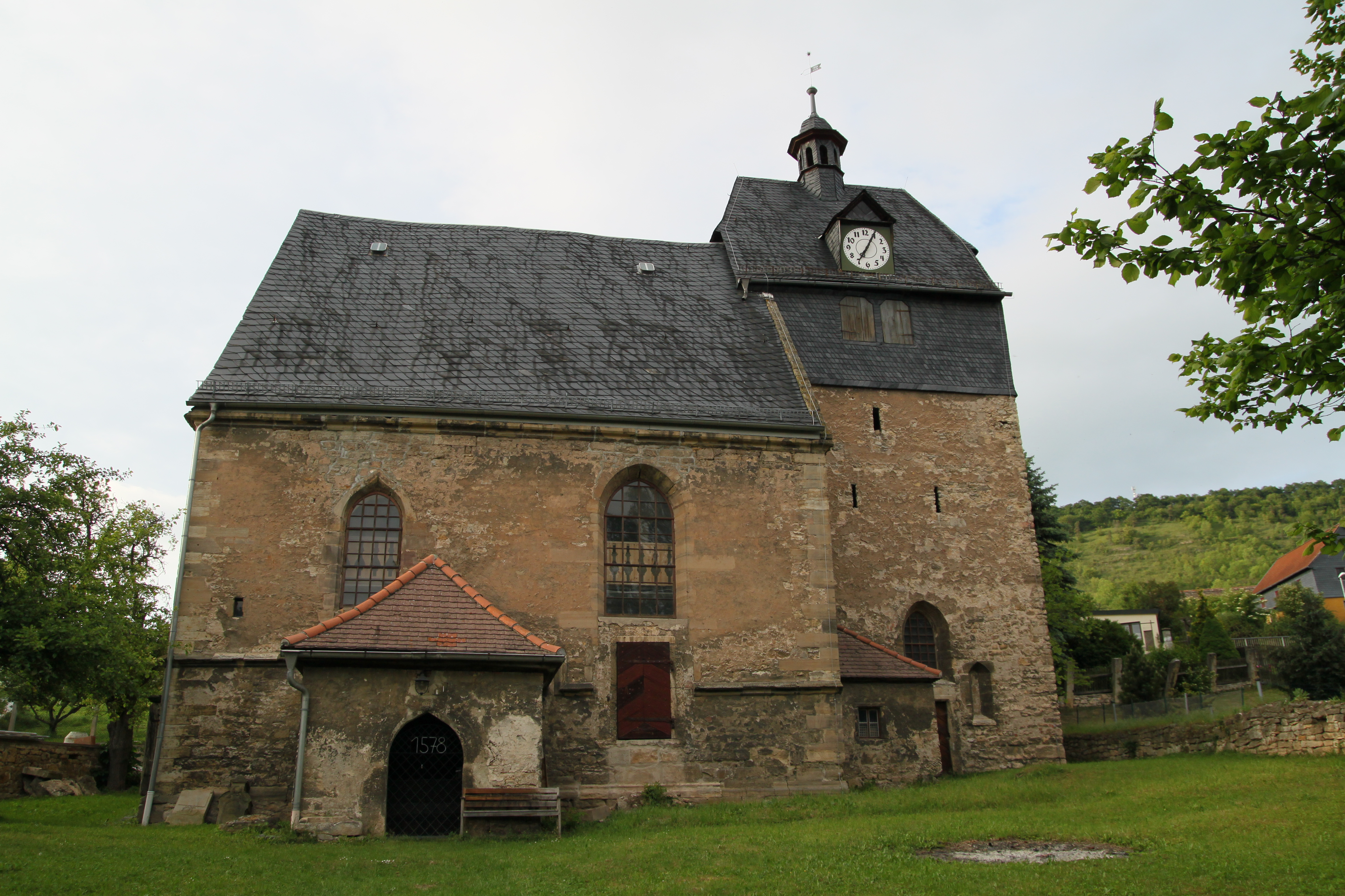 St. Trinitatis in Beutnitz